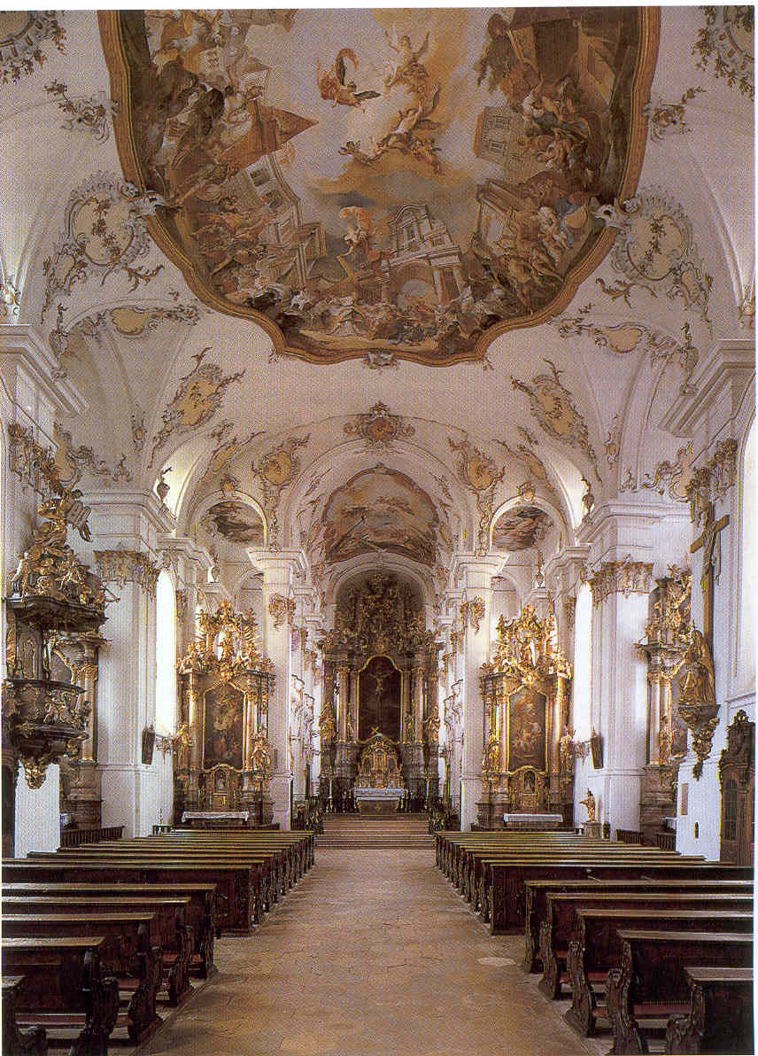 Innenansicht der Wallfahrtskirche Heilig Kreuz in Bergen bei Neuburg.